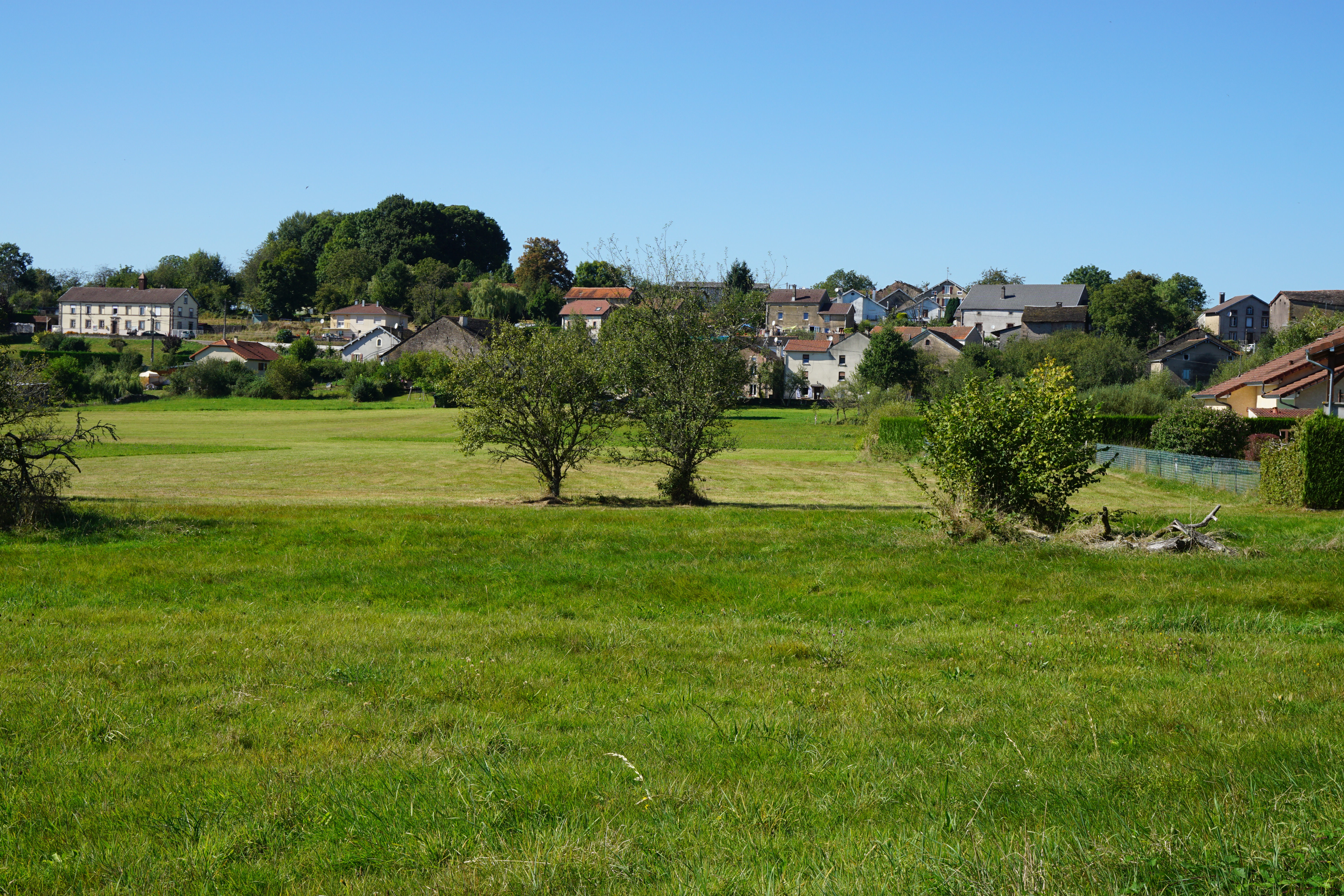 La Vaivre.